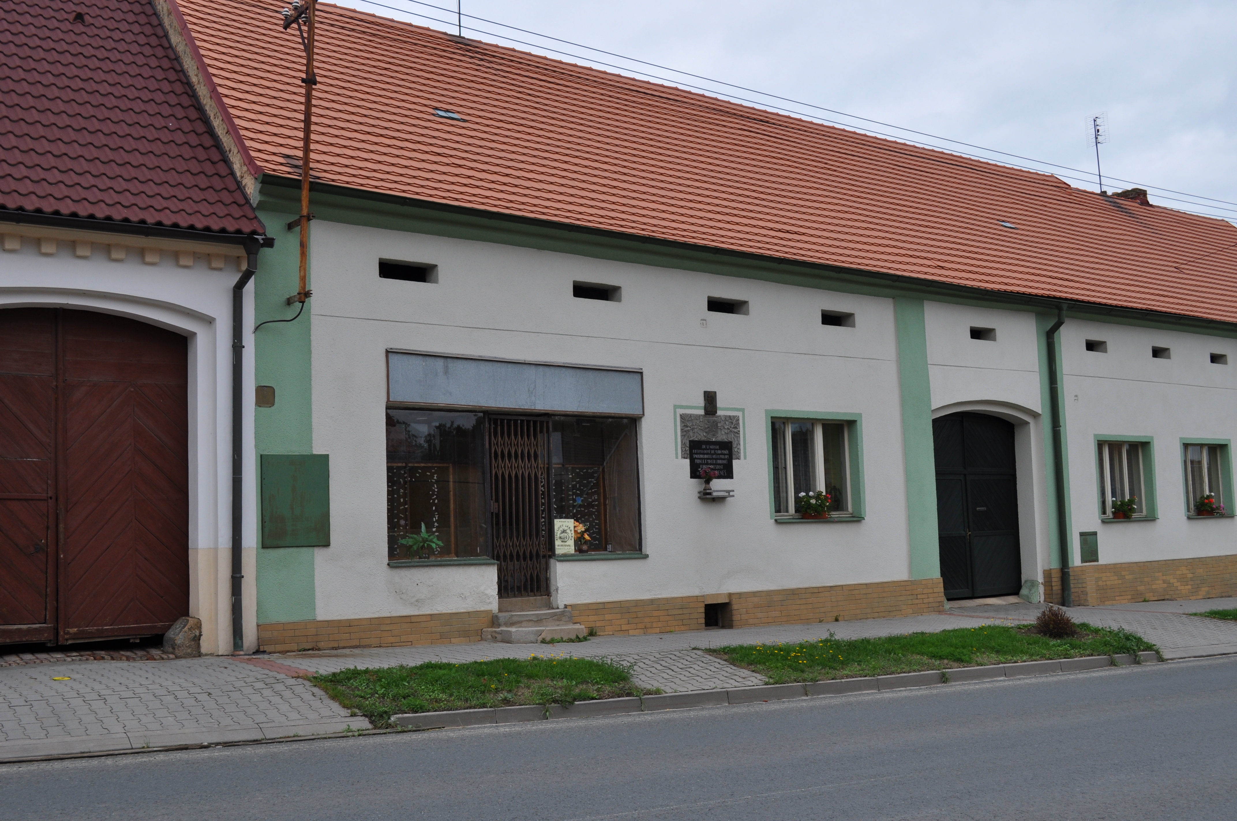 Rodný dům dr. Edvarda Beneše, Kožlany